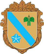 Герб Березнівського району